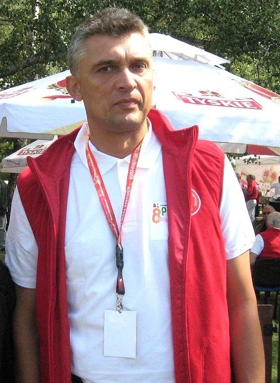 Ireneusz Kłos (ur. 14 października 1959 roku) - były siatkarz reprezentacji Polski